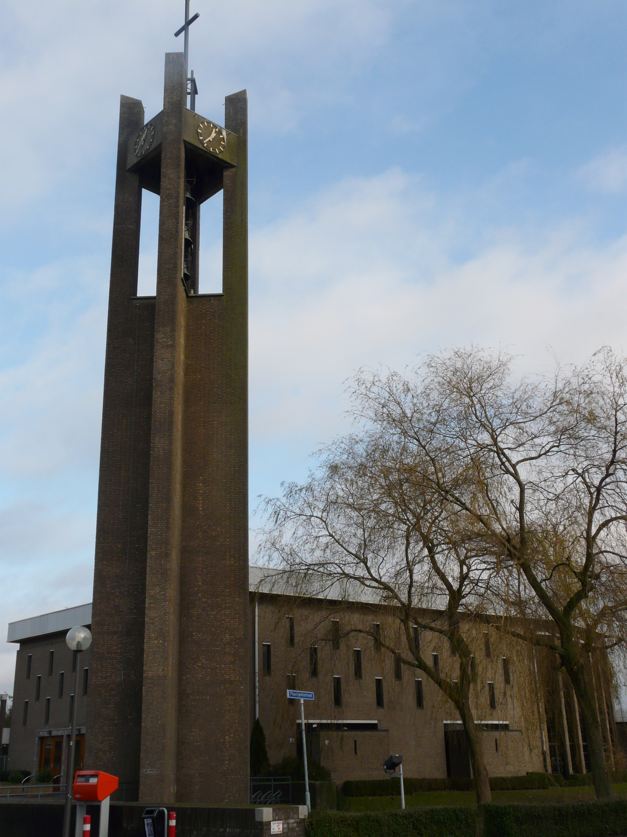 Zicht op een deel van de Onze Lieve Vrouw Hemelvaartkerk, Markt 34, 4841 AC Prinsenbeek. Gelegen in het centrum van Prinsenbeek, nabij Breda